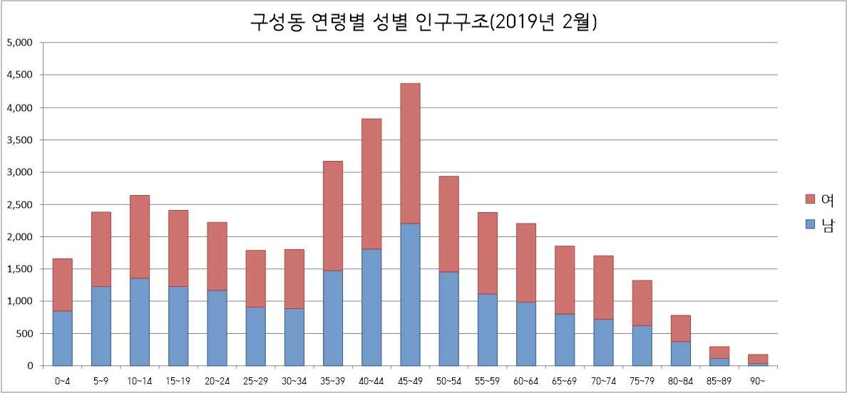 인구 그래프